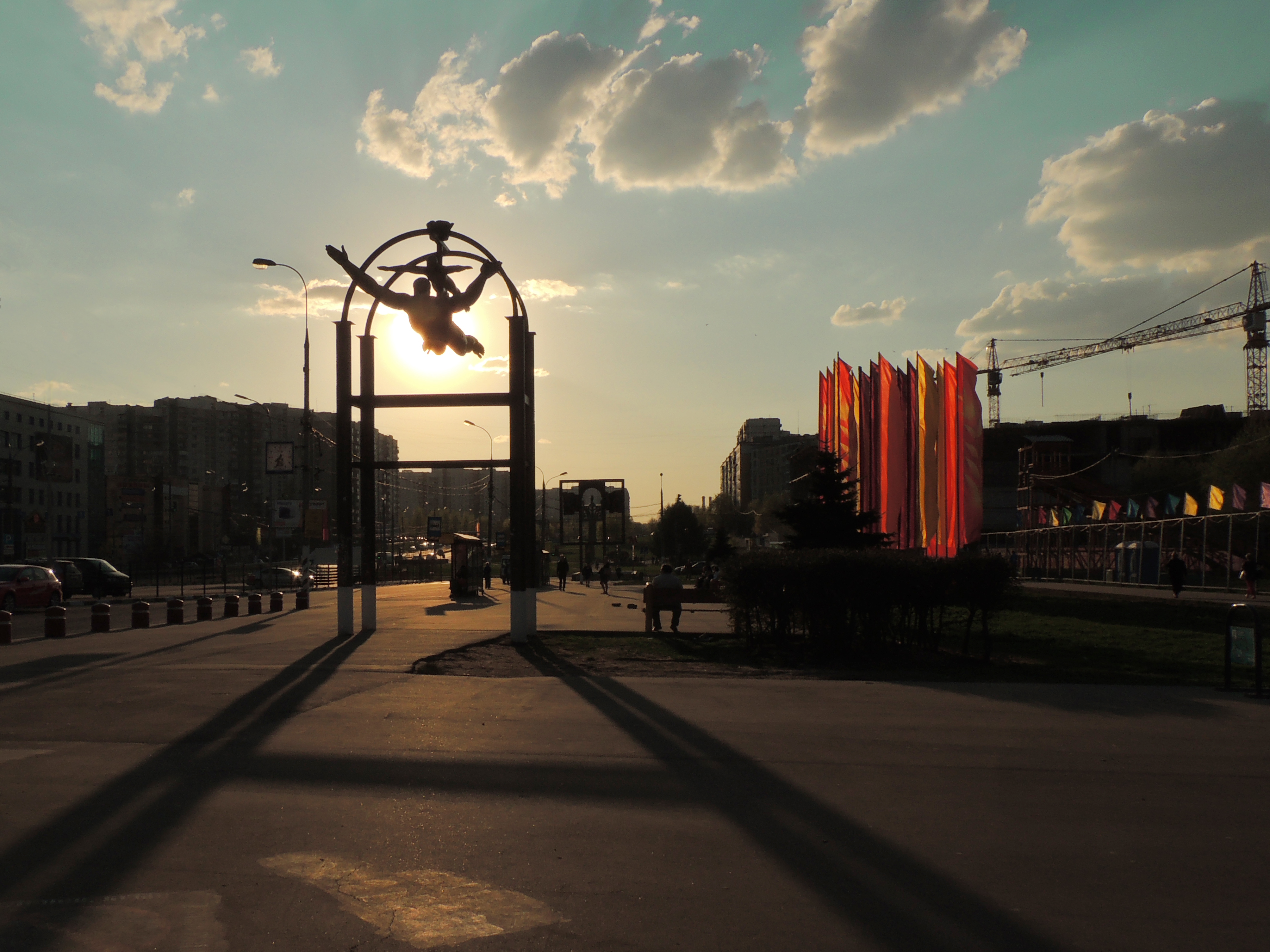 Экстравагантный памятник " Парящие в Ясенево "